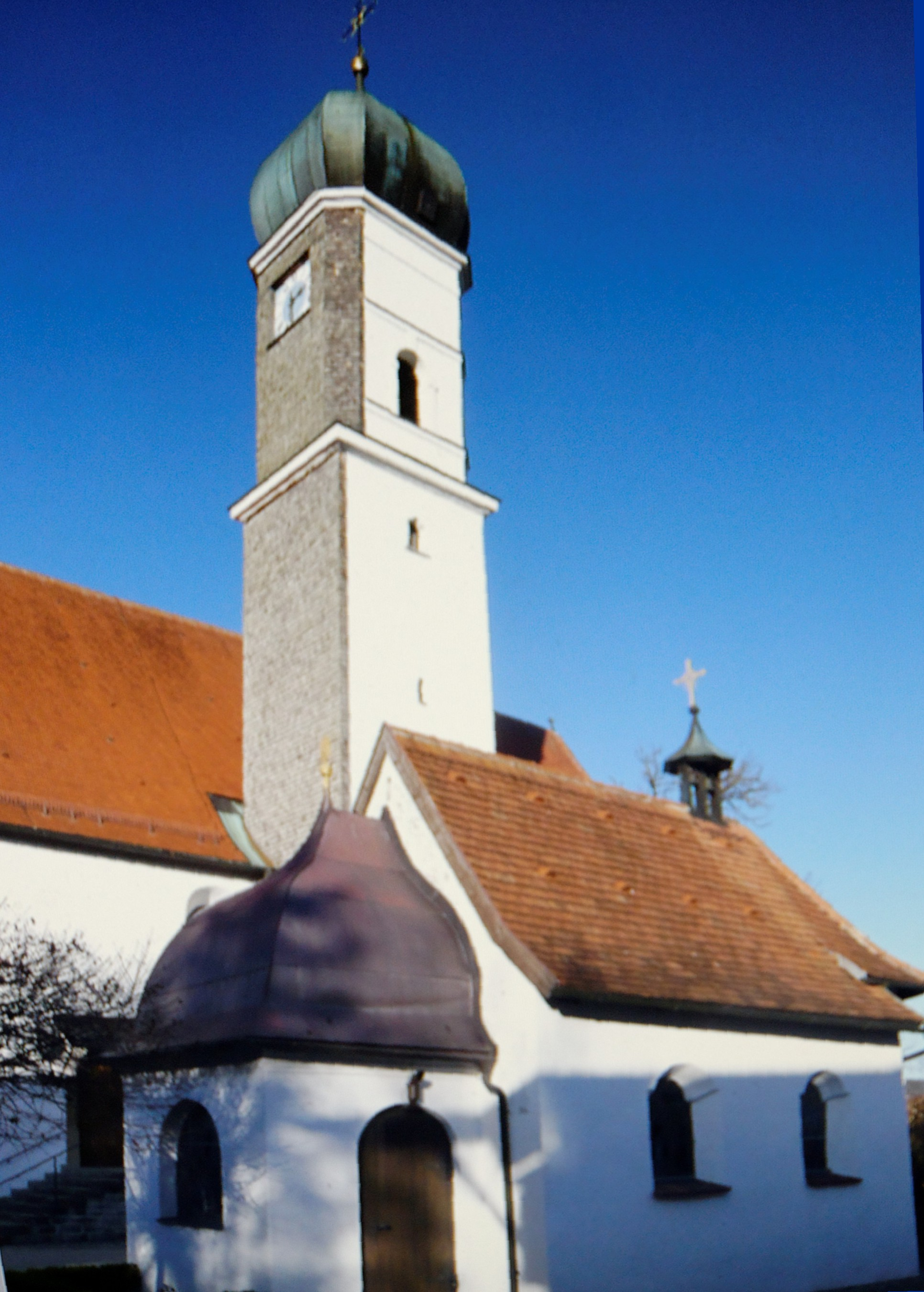 Gnadenkapelle und Wallfahrtskirche in Speiden, Gde. Eisenberg (Ostallgäu)